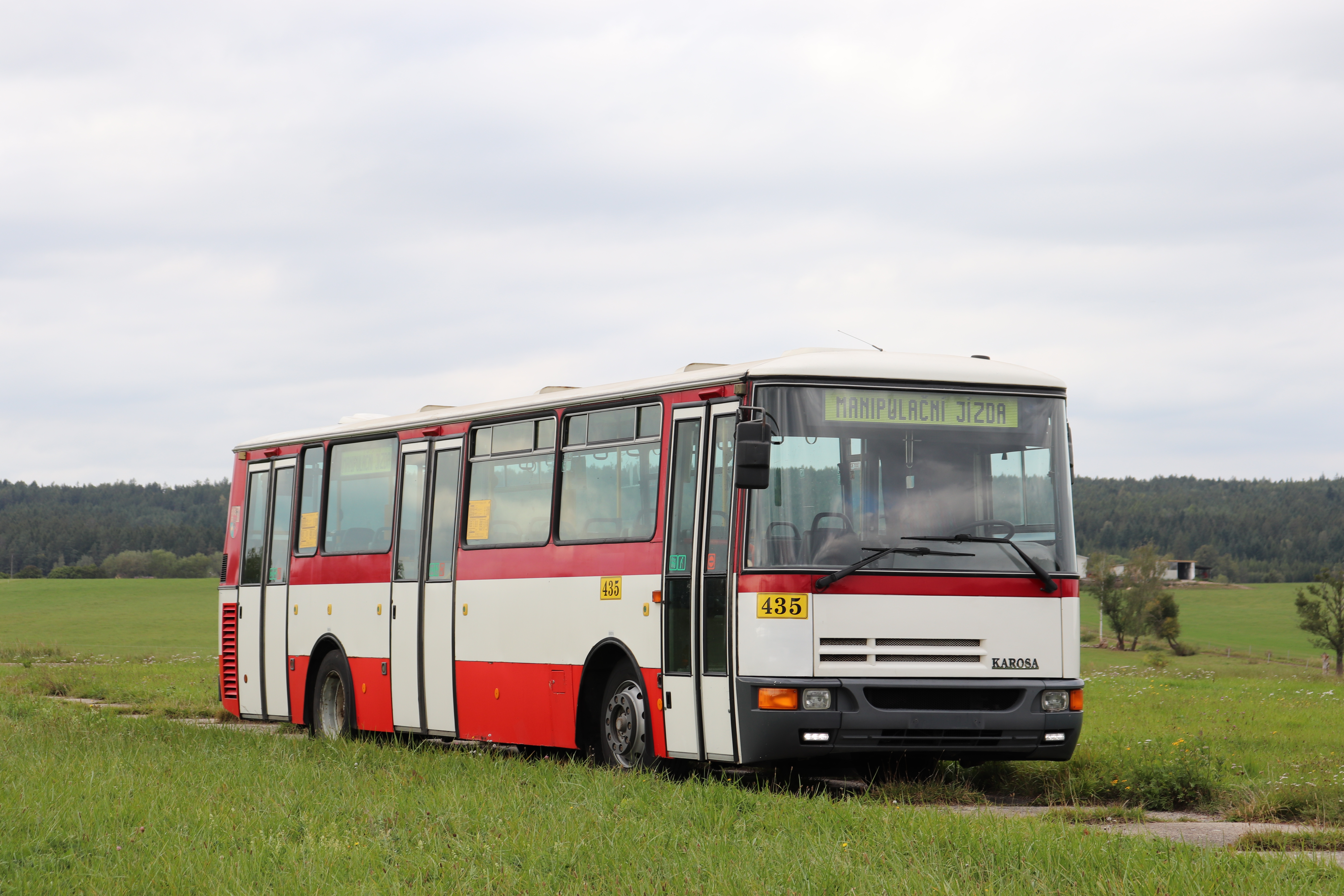 Plzeňská Karosa B 932, přestavěná z B 931